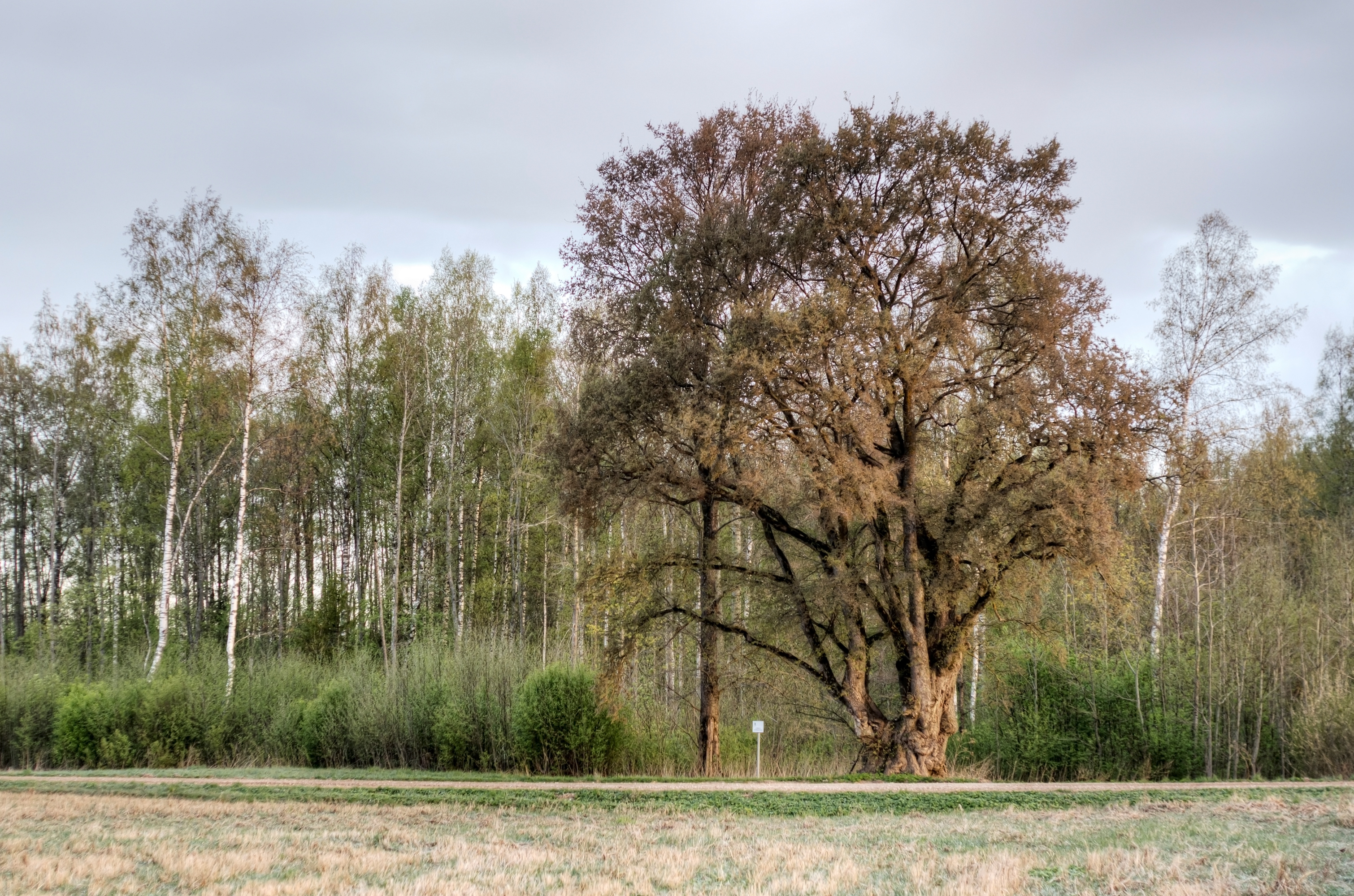 Lümati künnapuu